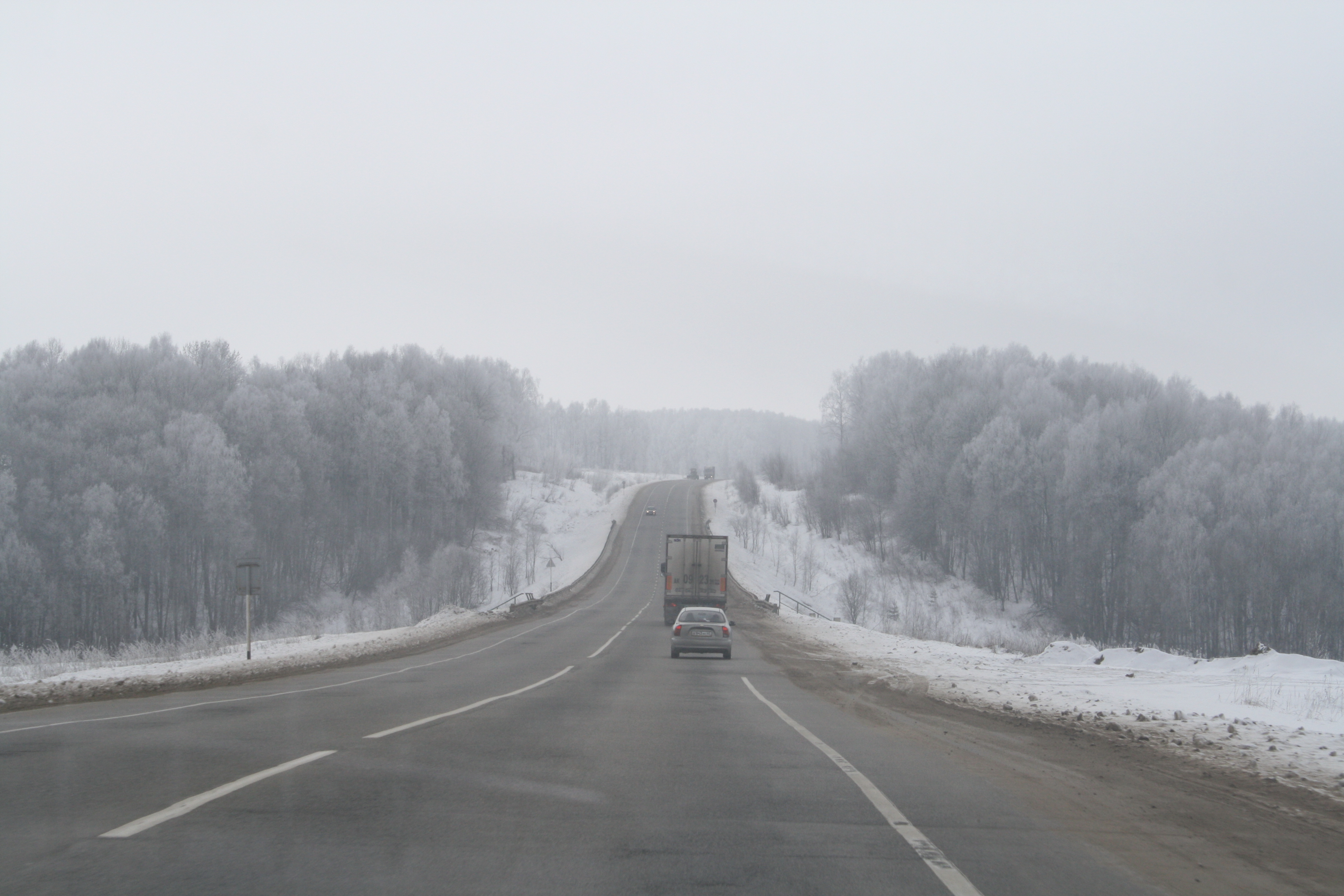 The road from Moscow to Crimea. Orel reg. Russia. Дорога из Москвы в Крым. Орловская обл. Россия